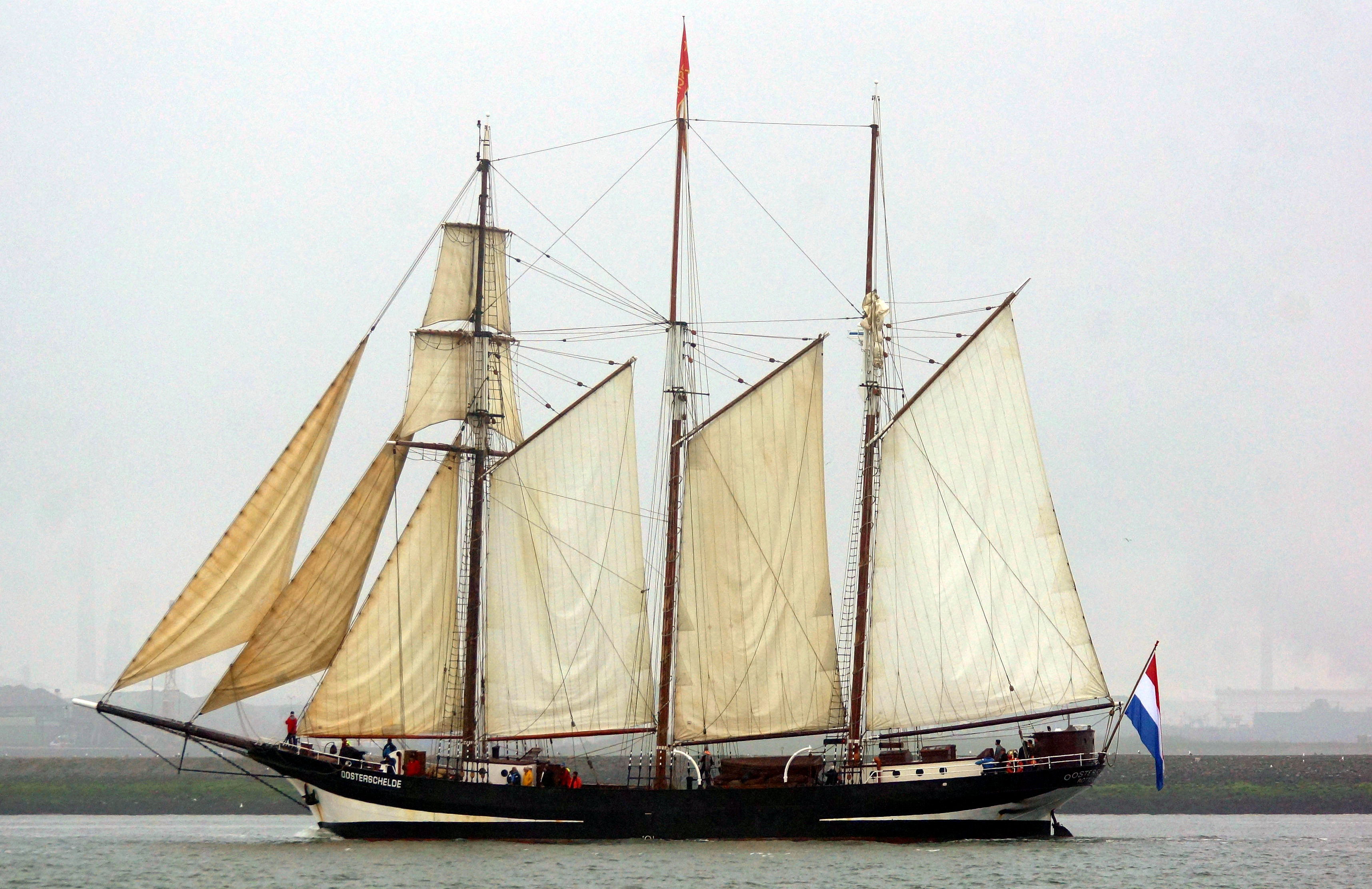 Nieuwe Waterweg 30-4-2014. OOSTERSCHELDE terug naar Rotterdam na wereldreis van 1 1/2 jaar.